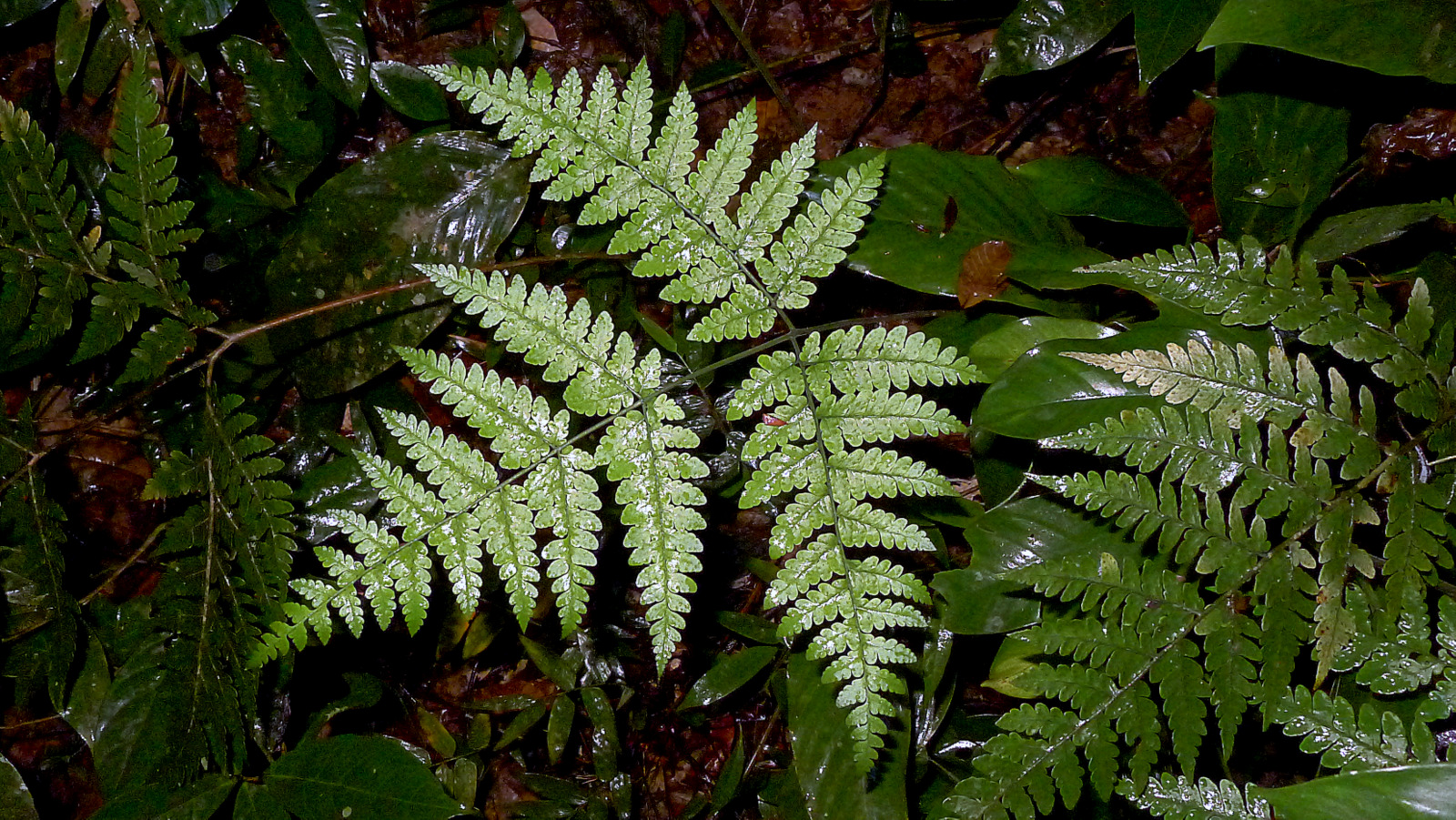 Triplophyllum hirsutum (Holttum) J.Prado & R.C.Moran